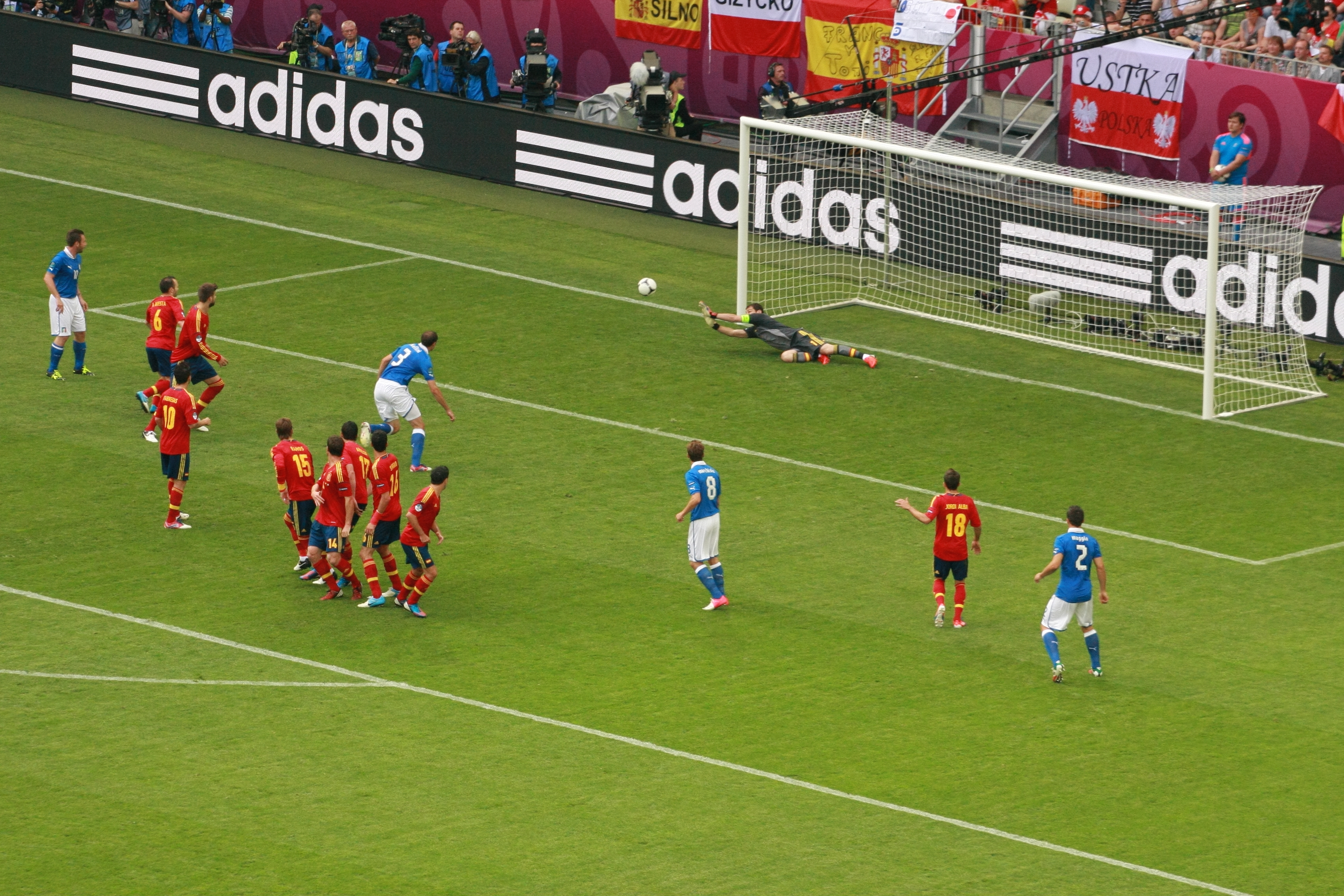 UEFA Euro 2012